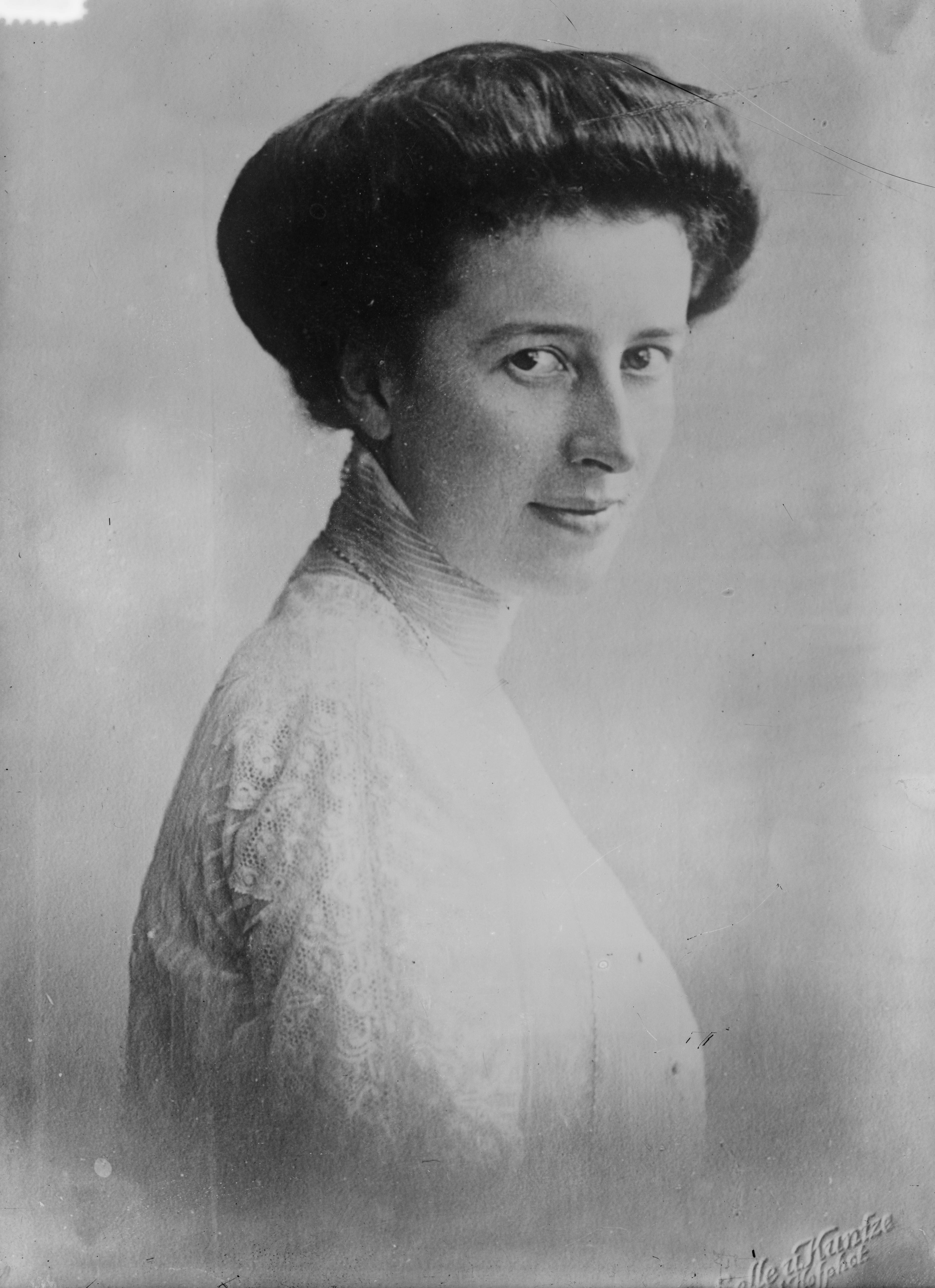 Countess Ina Marie von Bassewitz